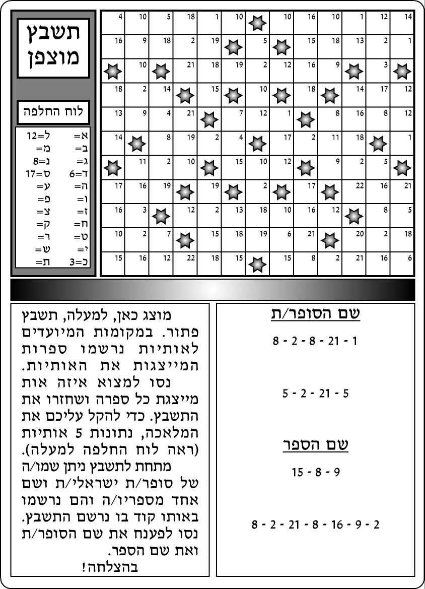 code crossword puzzle